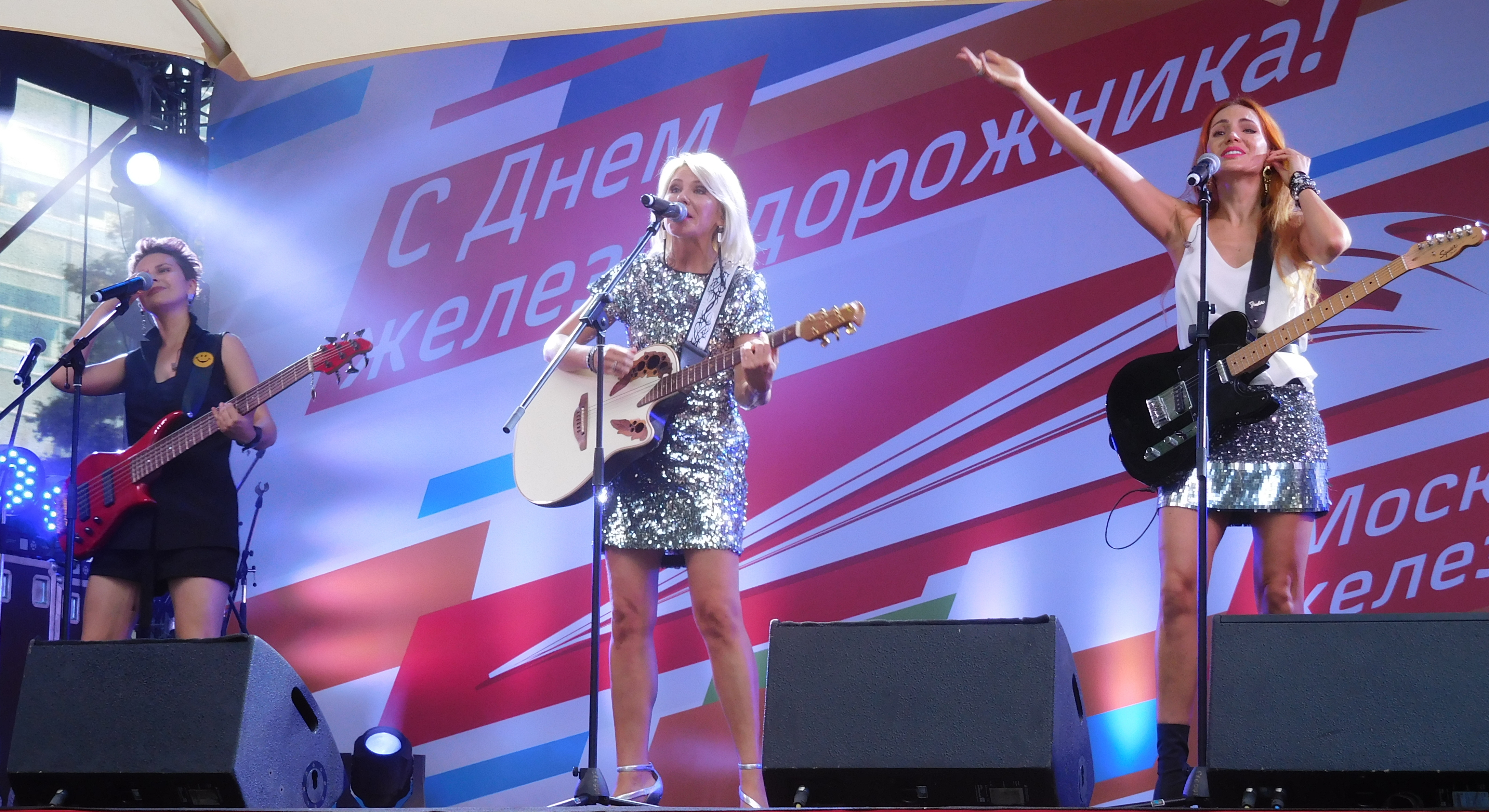 Группа «Лицей» в 2018 году (Екатерина Непрук, Анастасия Макаревич, София Тайх)